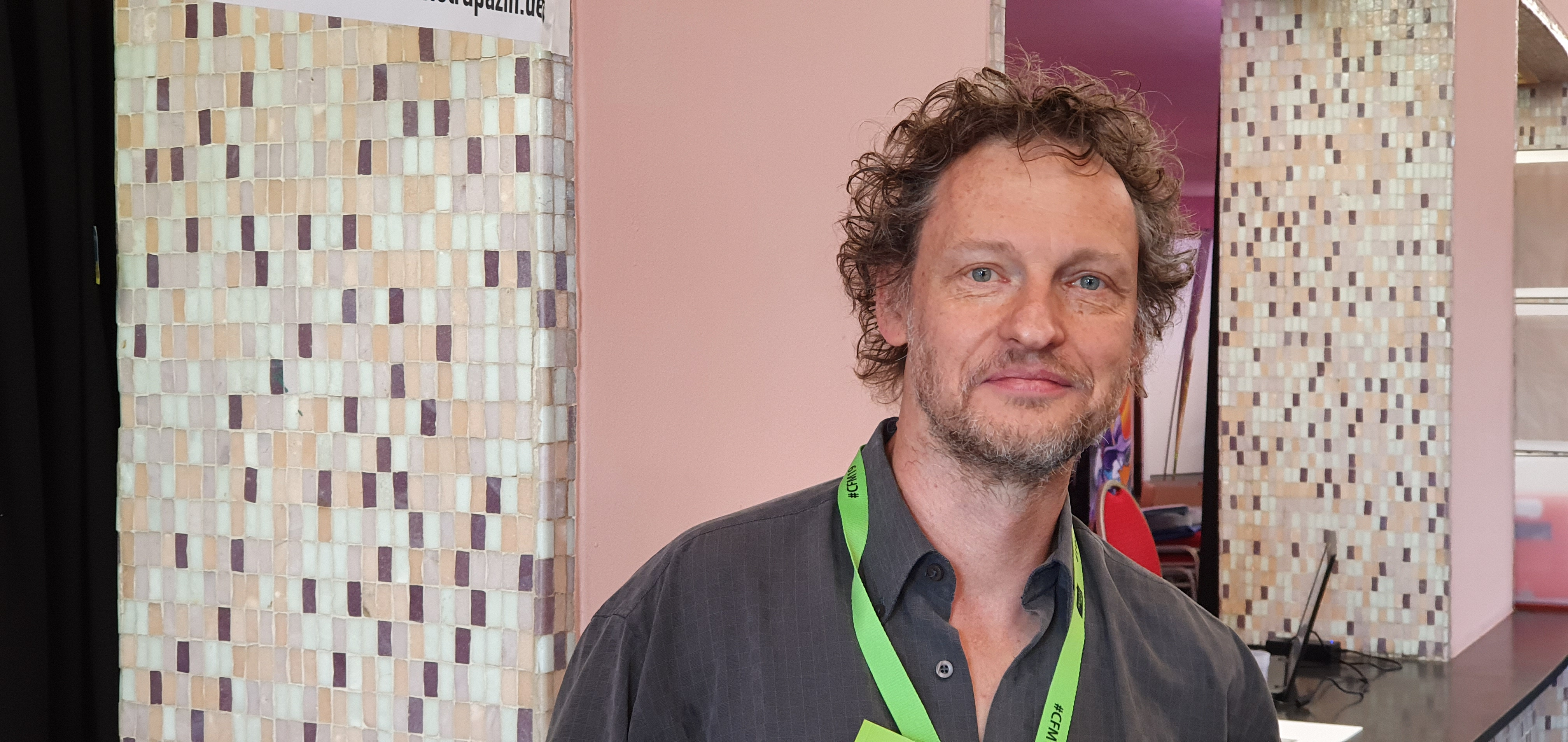 Comicfestival München 2019 Ralf Palandt